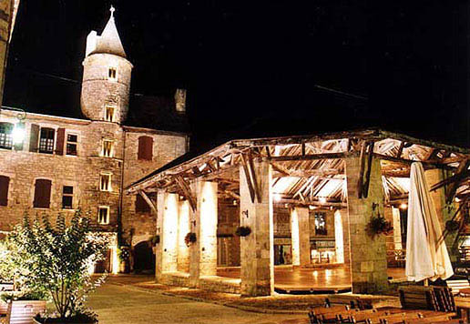 Place de la Halle et hôtel Fabri